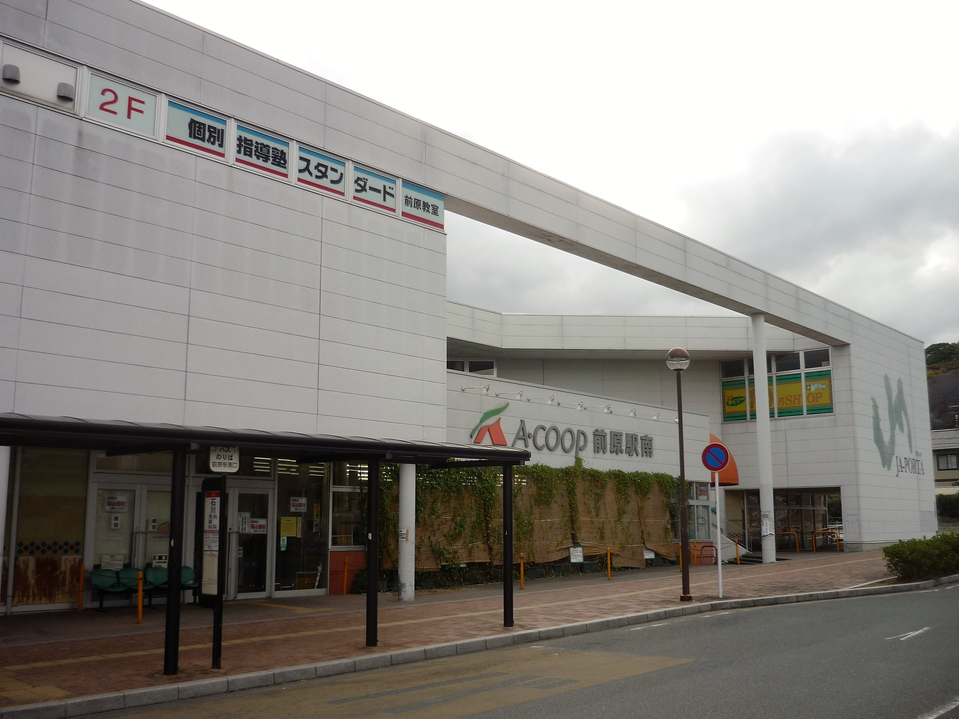 A-COOP 前原駅南店（糸島市前原駅南） Panasonic Lumix DMC-FS3